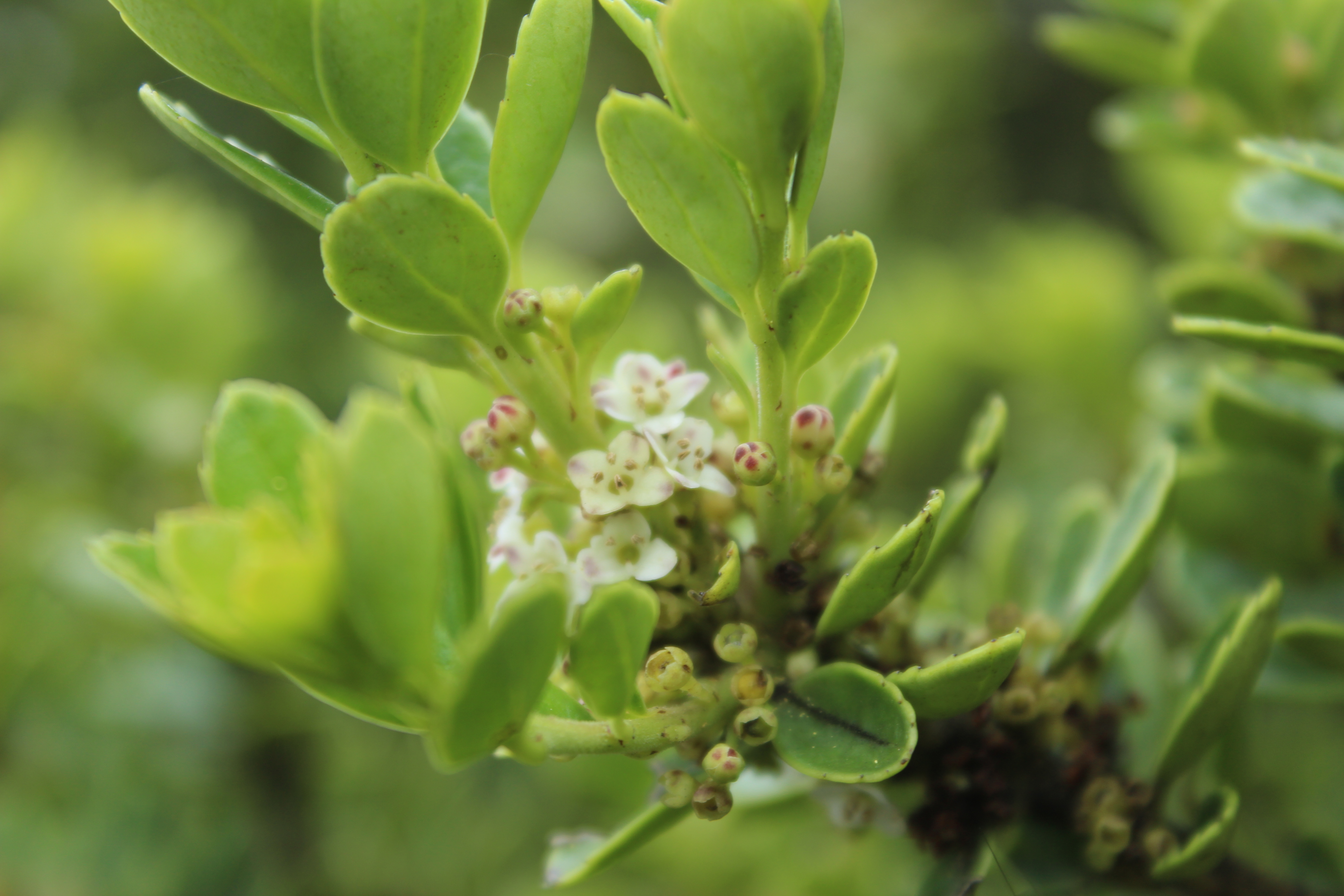 Ilex kunthiana en Duitama, Boyaca, Colombia